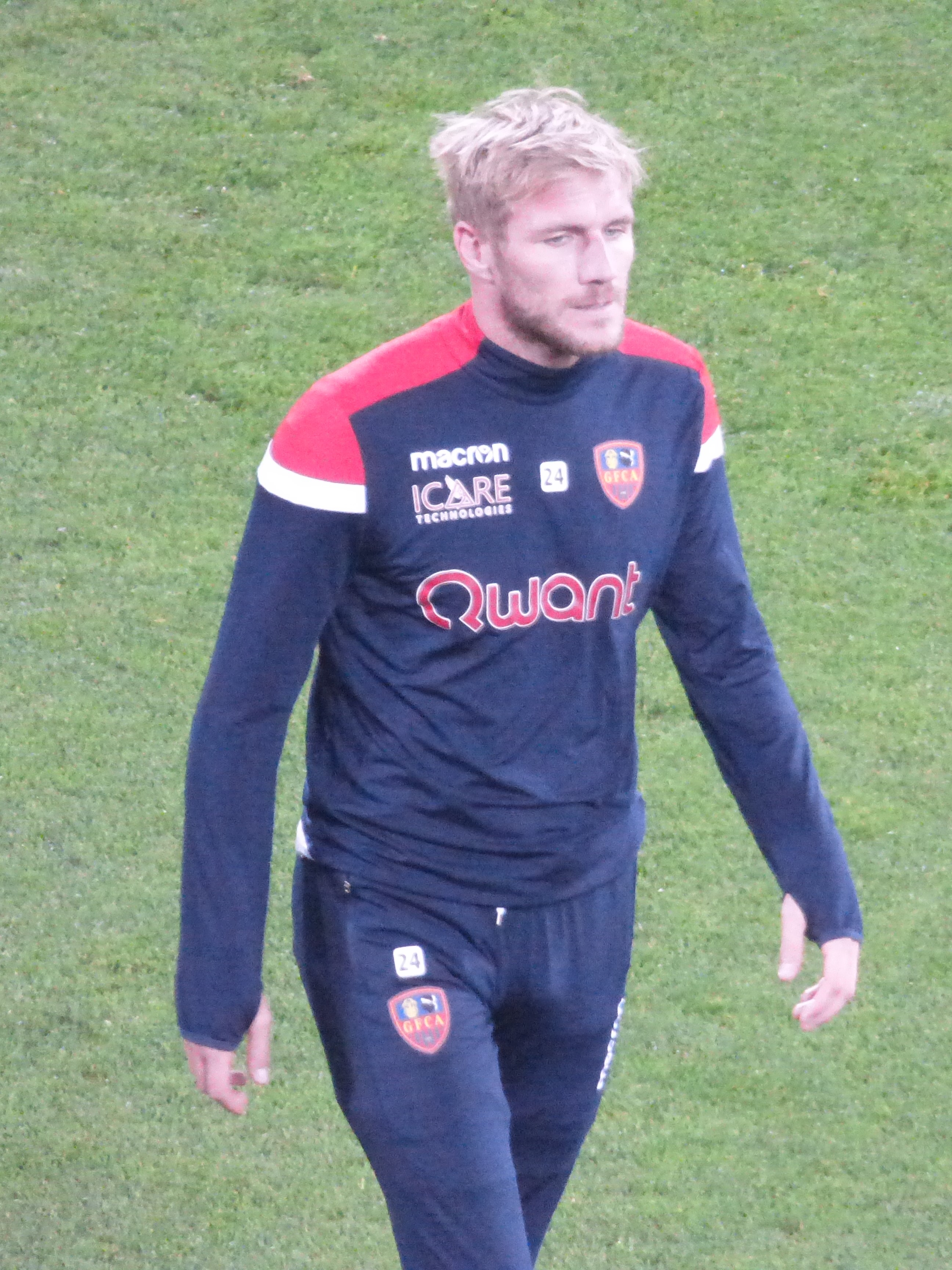 Damien Perquis avant le match RC Lens / GFC Ajaccio, comptant pour la onzième journée du championnat de France de Ligue 2 2018-2019 au Stade Bollaert-Delelis, le 22 octobre 2018.